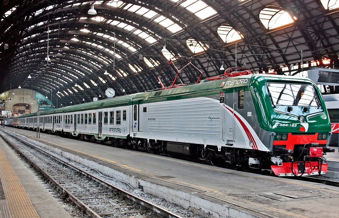 La E 464.193 in livrea Trenord a Milano Centrale